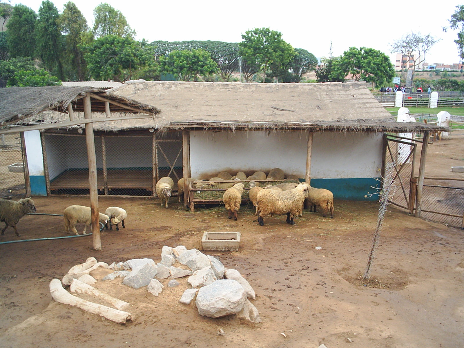 Ovejas del Parque de las leyendas, distrito de San Miguel, Lima, Perú